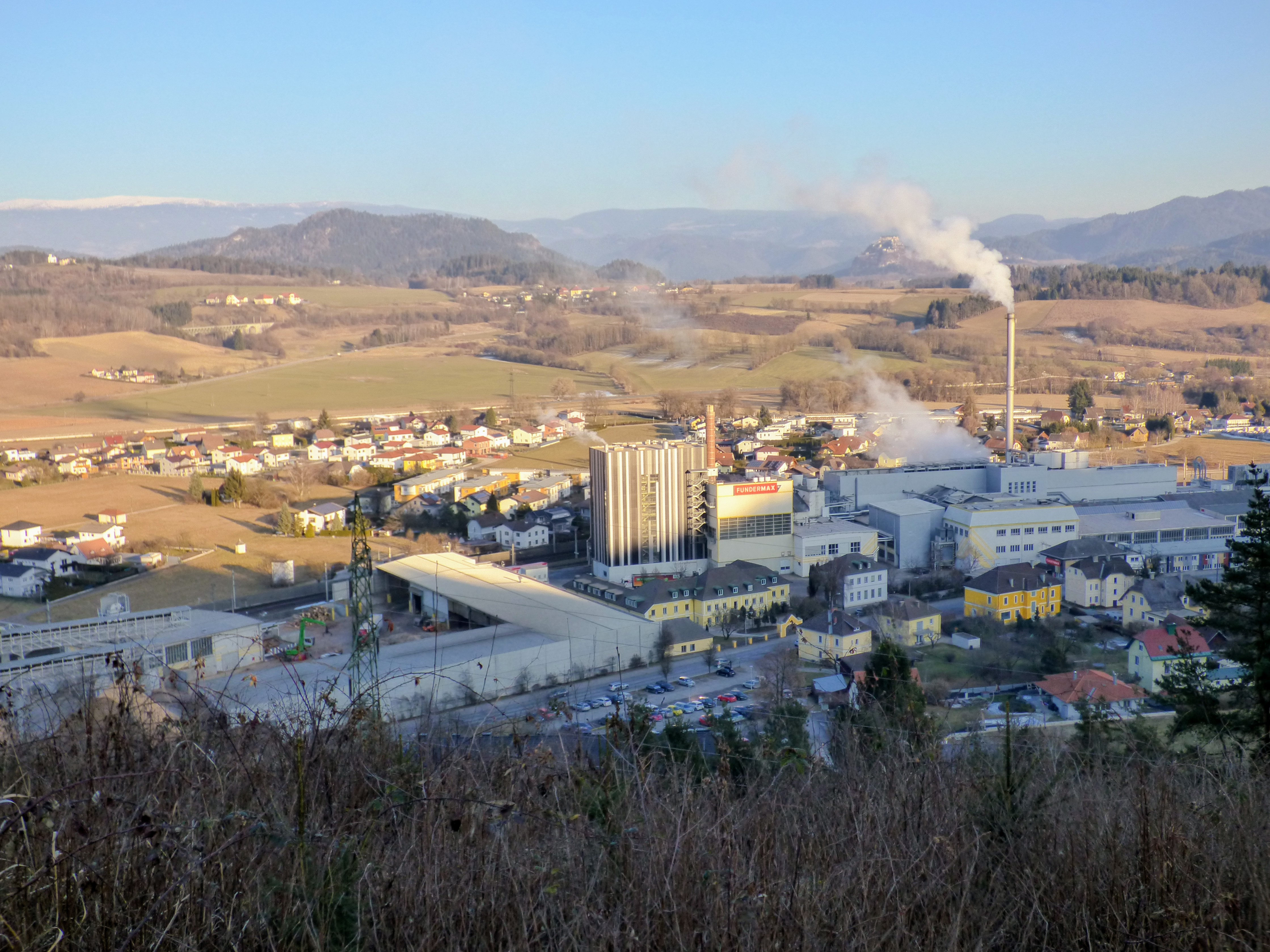 Glandorf, Gemeinde Sankt Veit an der Glan